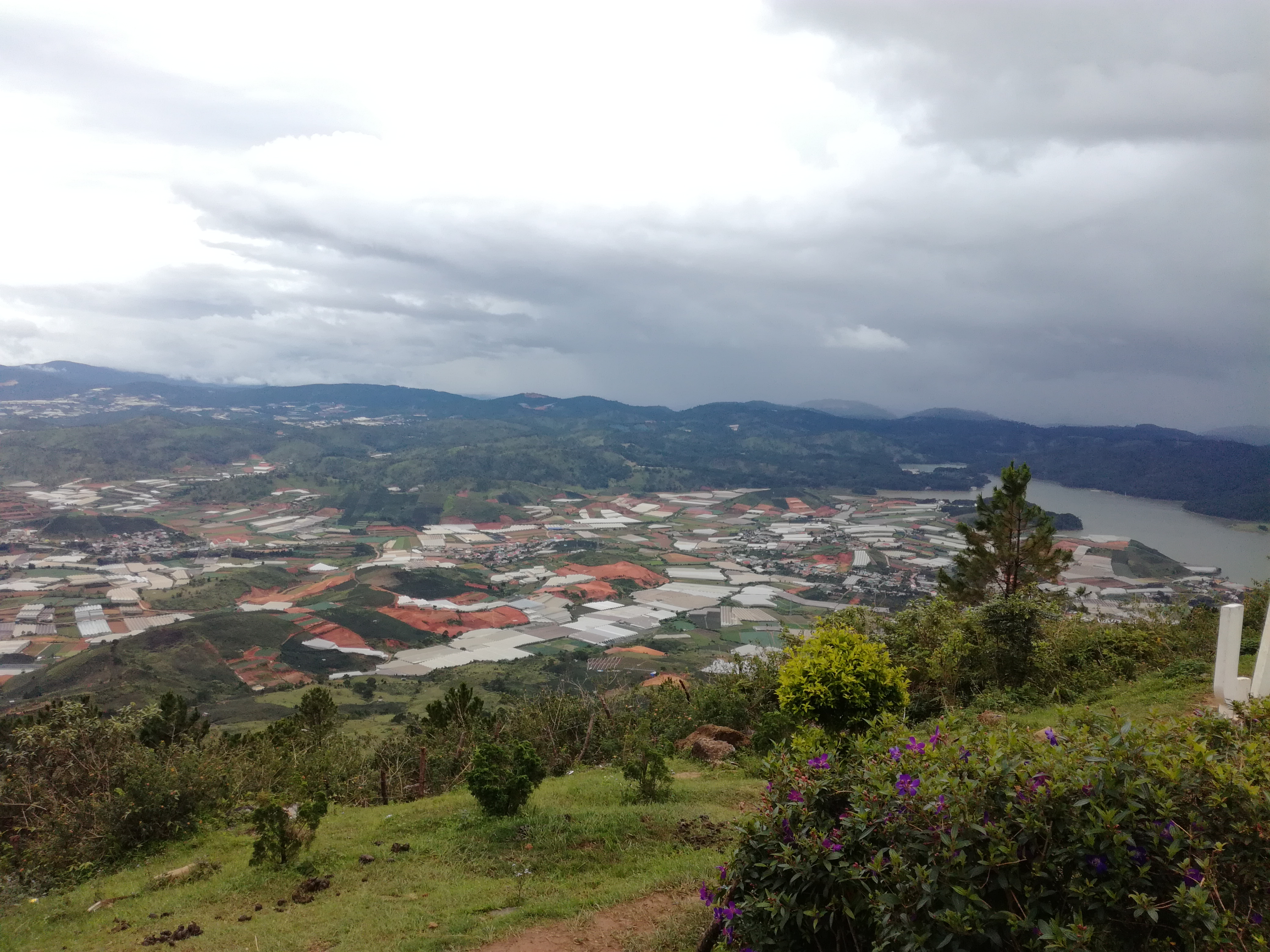 Langbiang Mountain (August 6, 2018)